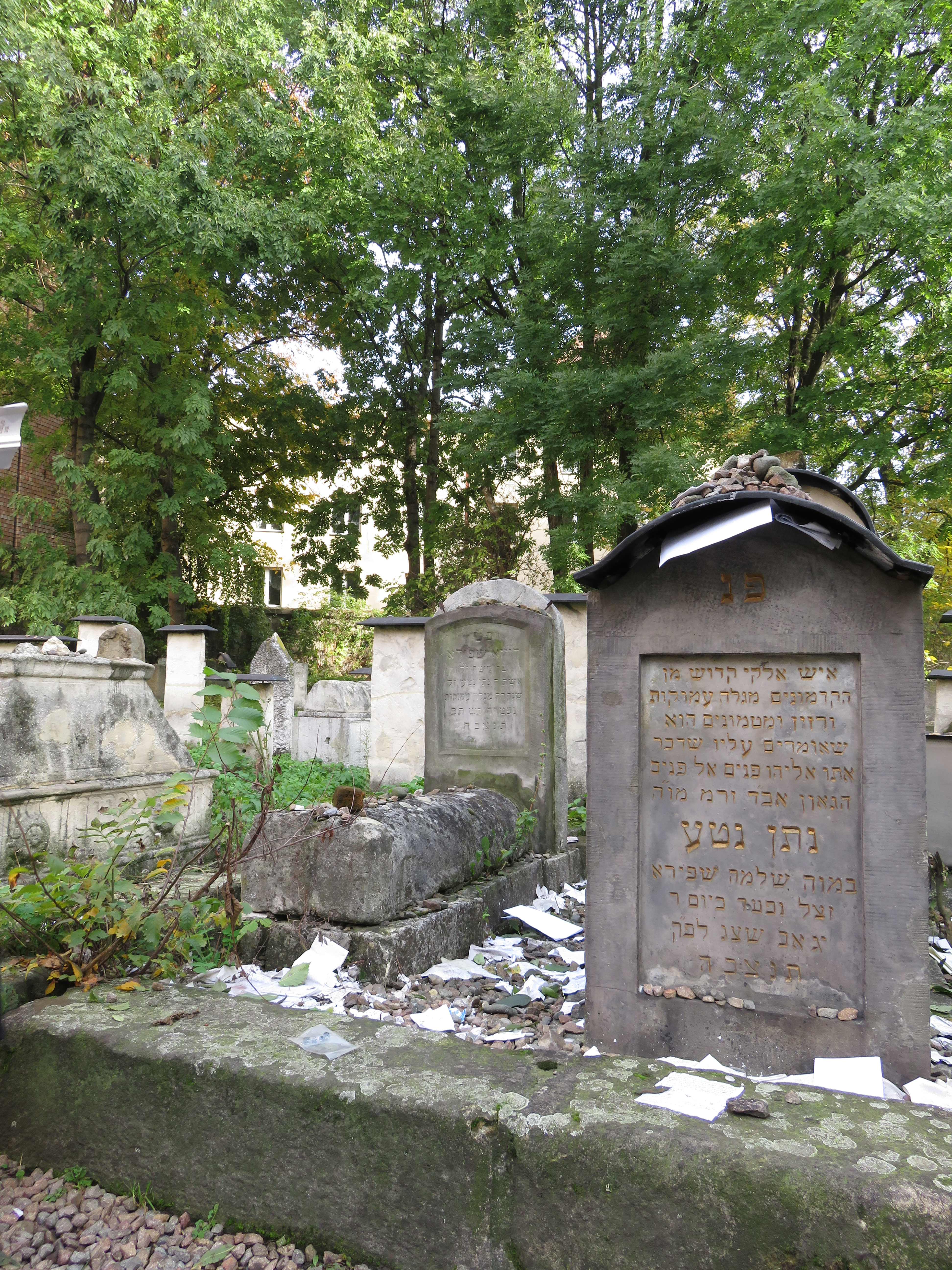 מצבת רבי נתן נטע שפירא. בית הקברות היהודי העתיק בקרקוב (1).jpg